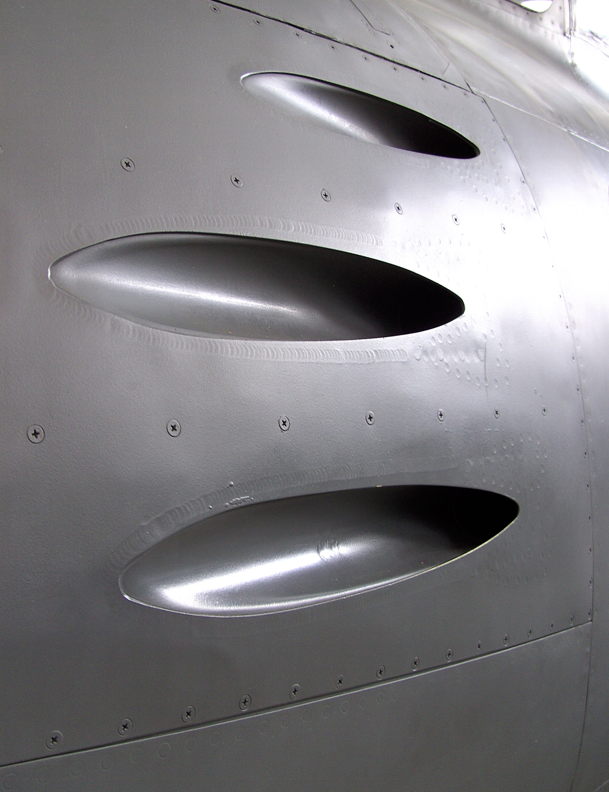 Drei Maschinengewehre einer Canadair Sabre der Bundeswehr.